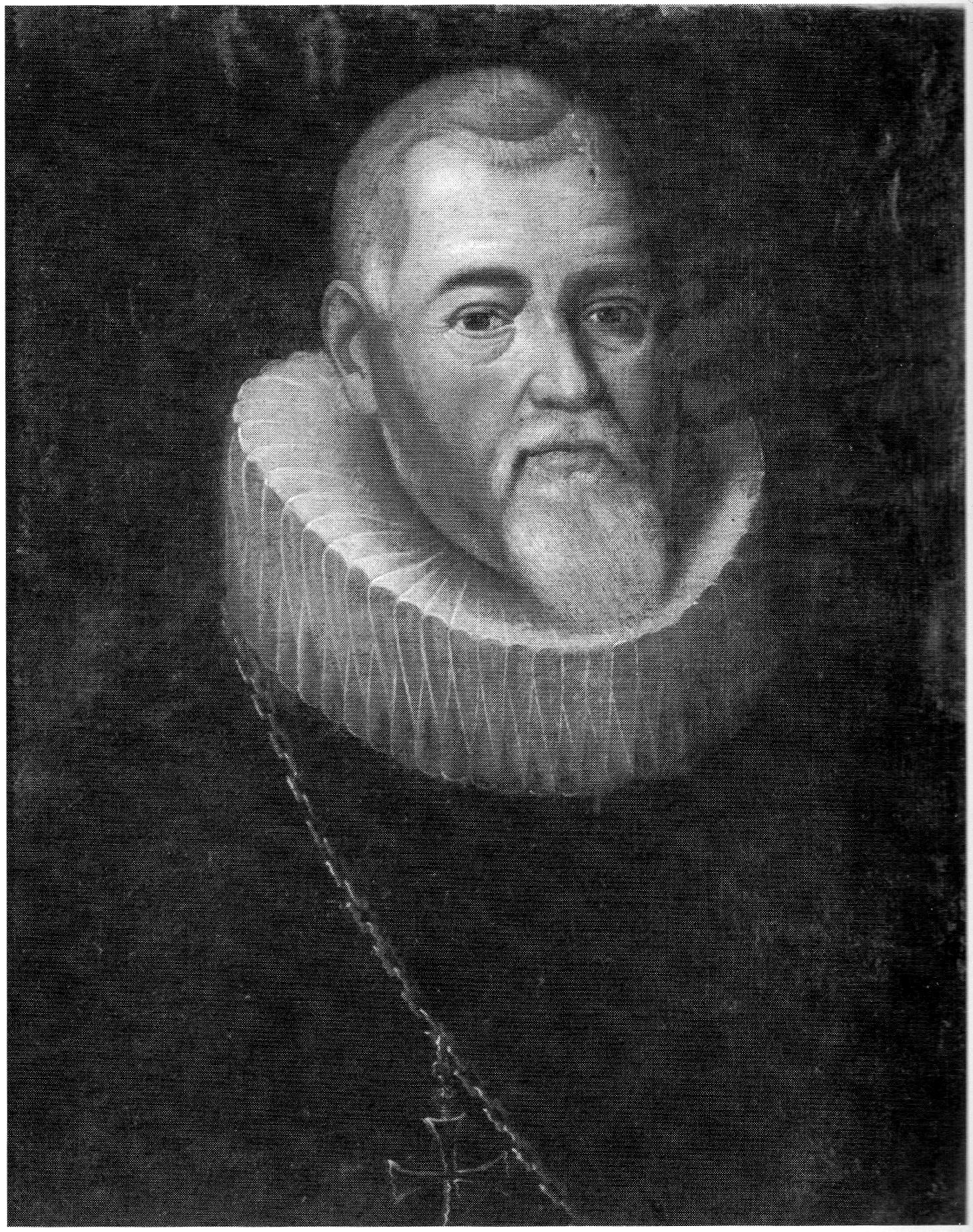 Jan Adolf van Imstenrade